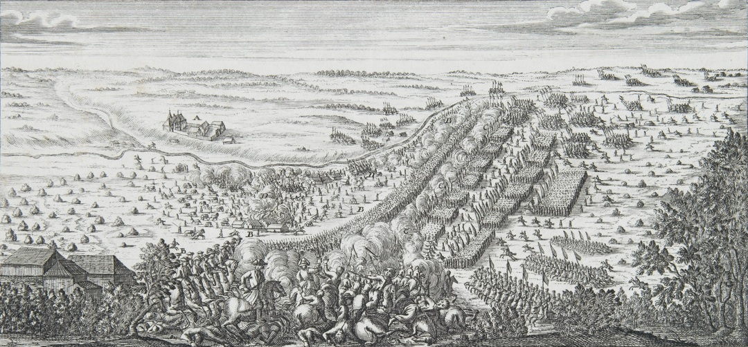 Scan from Johann Christoph Brotze's book Sammlung verschiedner Liefländischer Monumente. Vorstellung der hefftigen und blutigen Action, welche von Ihro Königl. Maiestaet in Schweden in Curland … [1705; die Gravüre].